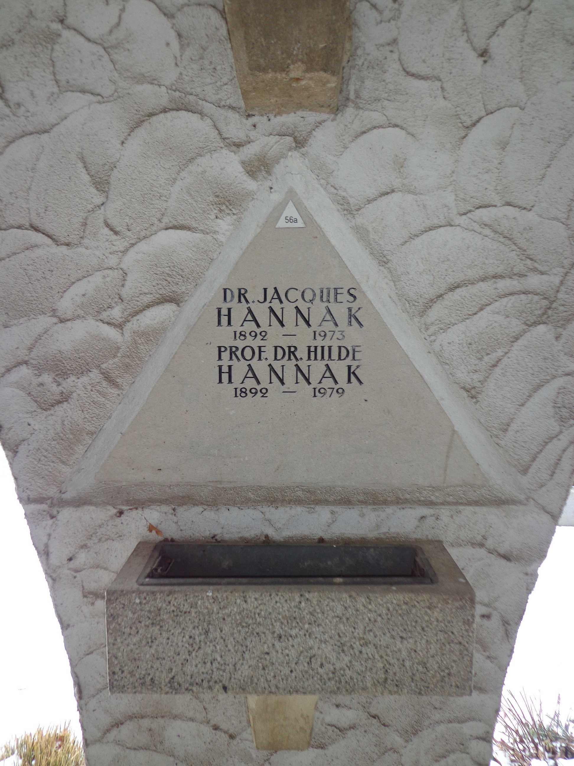 Feuerhalle Simmering - Arkadenhof (Abteilung ALI) - Urnengrab von Jacques und Hilde Hannak